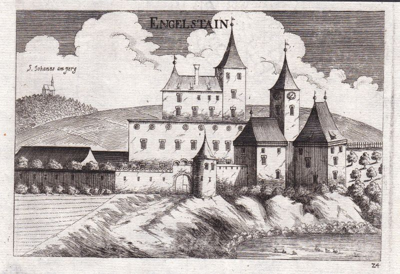 Kath. Filialkirche hl. Johannes der Täufer ehem. Burg Hadmarstein, Burg Engelstein